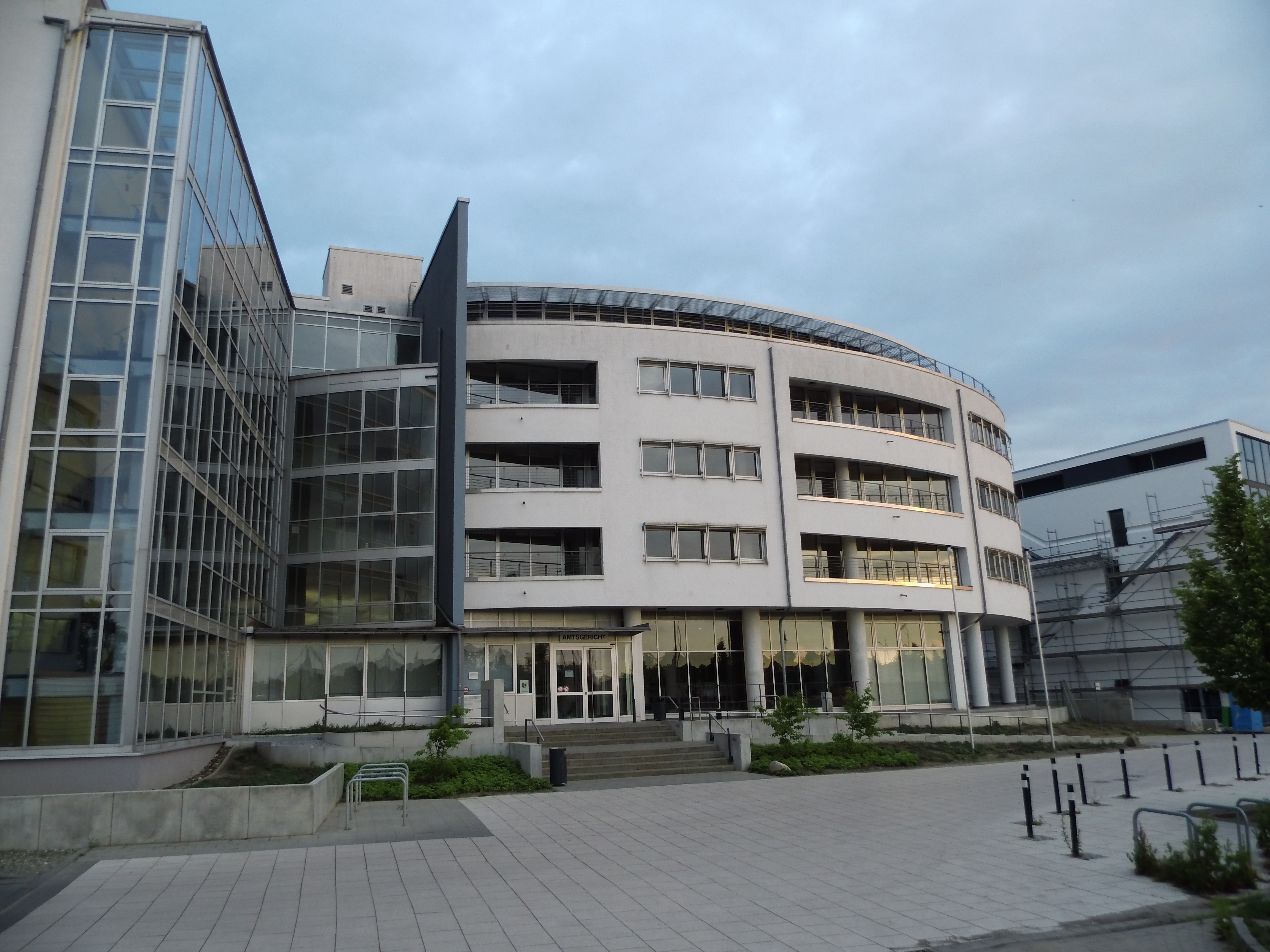 Amtsgericht am Rostocker Stadthafen